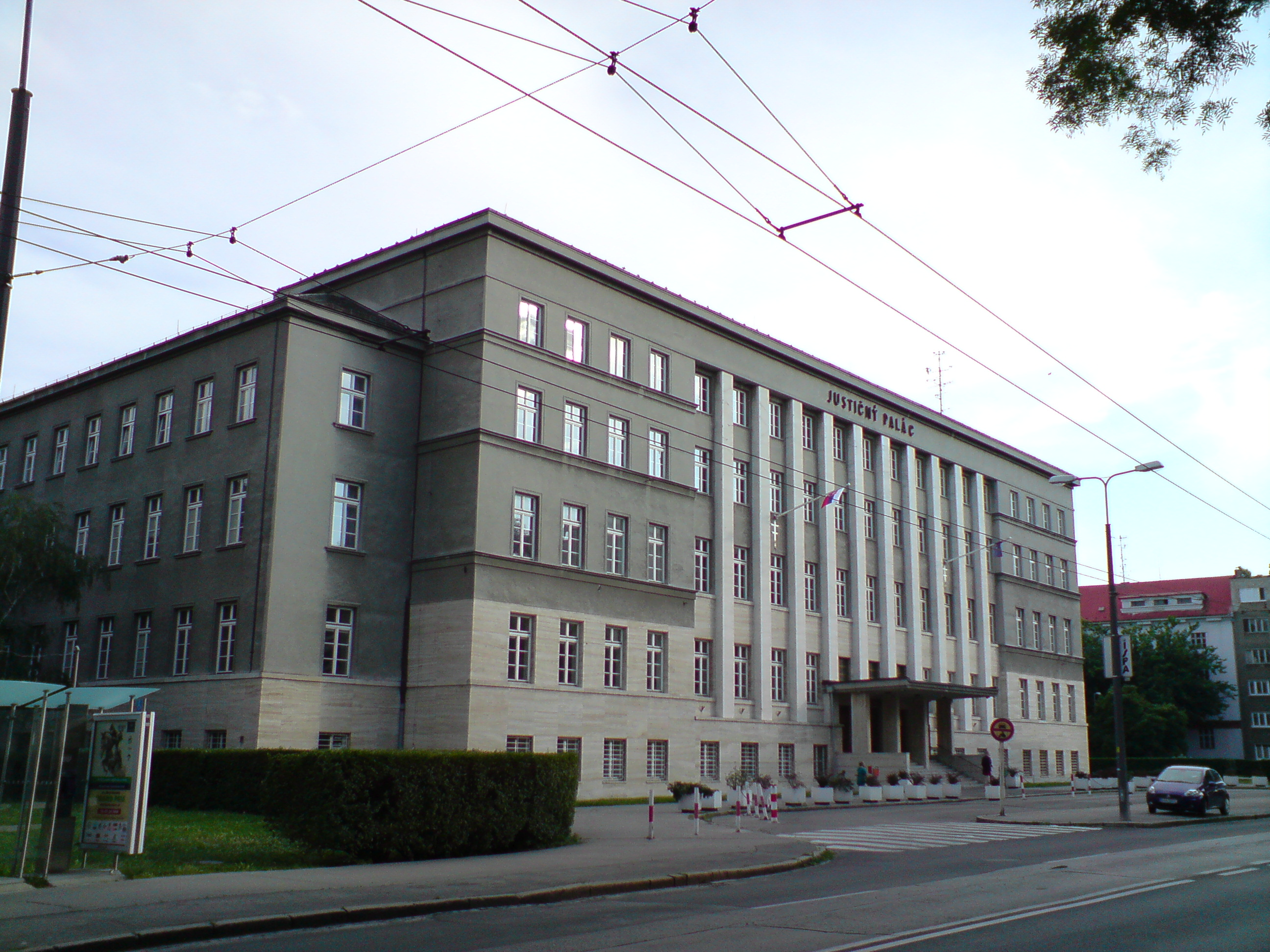 Justičný palác